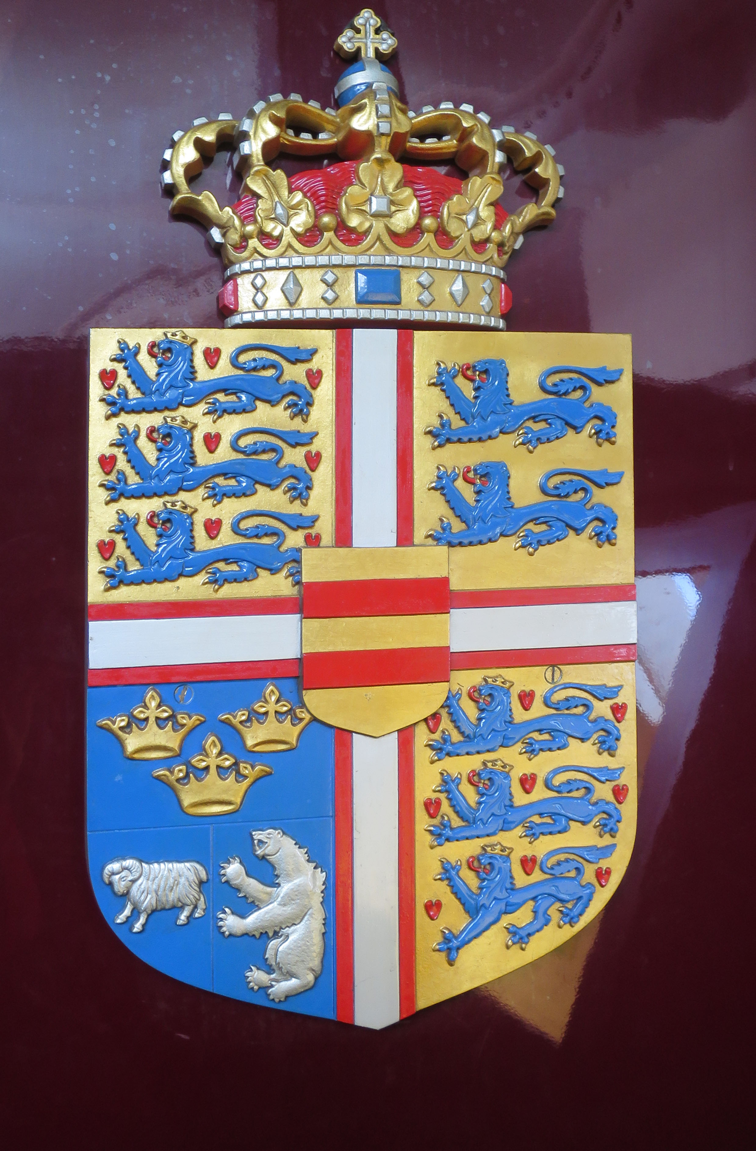 Wappen des königlich-dänischen Salonwagens 1 von 1937